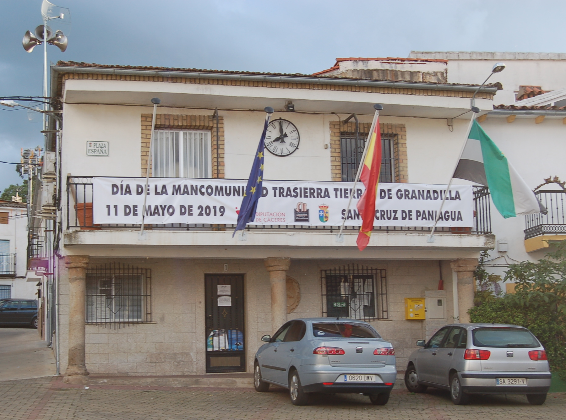 Casa consistorial de Santa Cruz de Paniagua